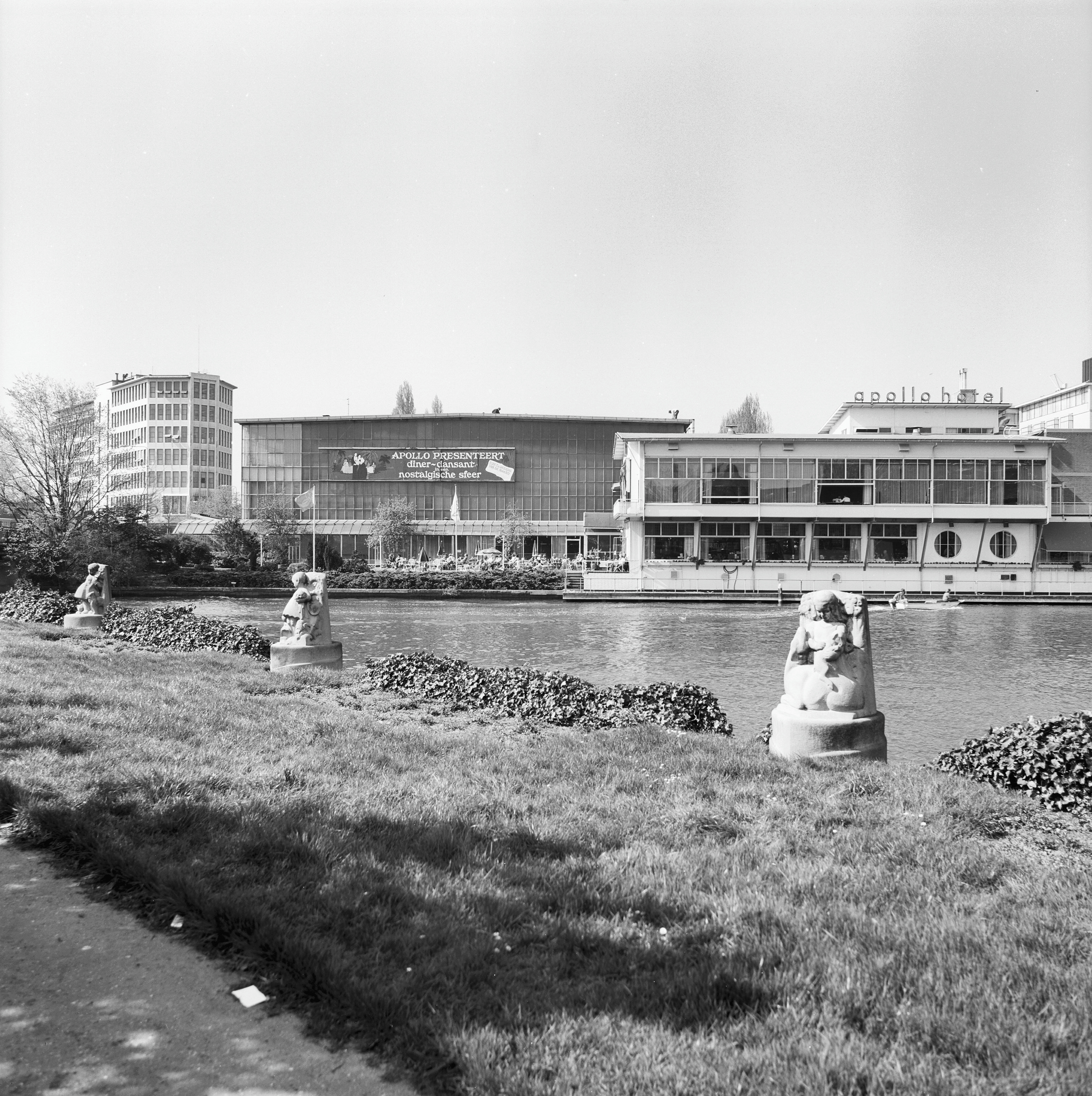 Hotel Apollo, hallen